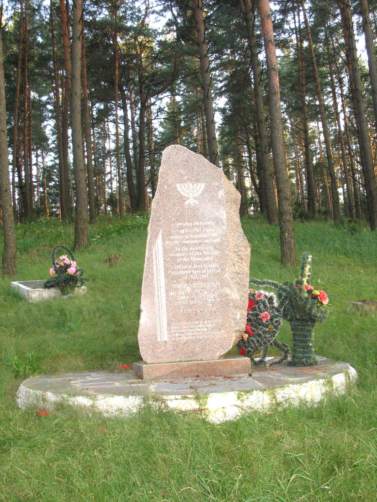 Памятник на братской могиле евреев деревни Новый Свержень Столбцовского района Минской области, убитых нацистами во время Холокоста.